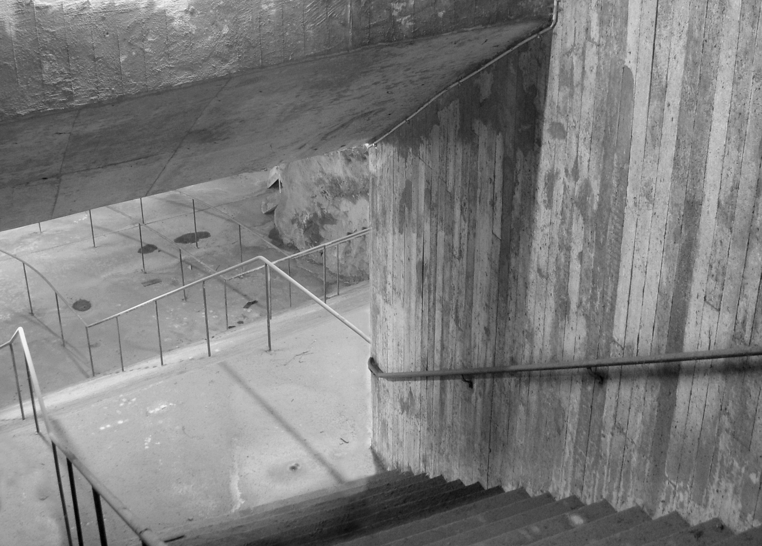 Skyddsrummet Johannes, inrymningstrappa från Kammakargatan